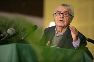 L'historien, philosophe et anthropologue français, spécialiste des mythes de la Grèce antique Jean-Pierre Vernant (1914-2007), lors de sa dernière intervention publique, conférence intitulée L'Odyssée donnée le 23 octobre 2006 au lycée Le Corbusier d'Aubervilliers dans le cadre des « Lundis du Collège de France » (année 2006-2007, cycle Classiques de la mémoire humaine).